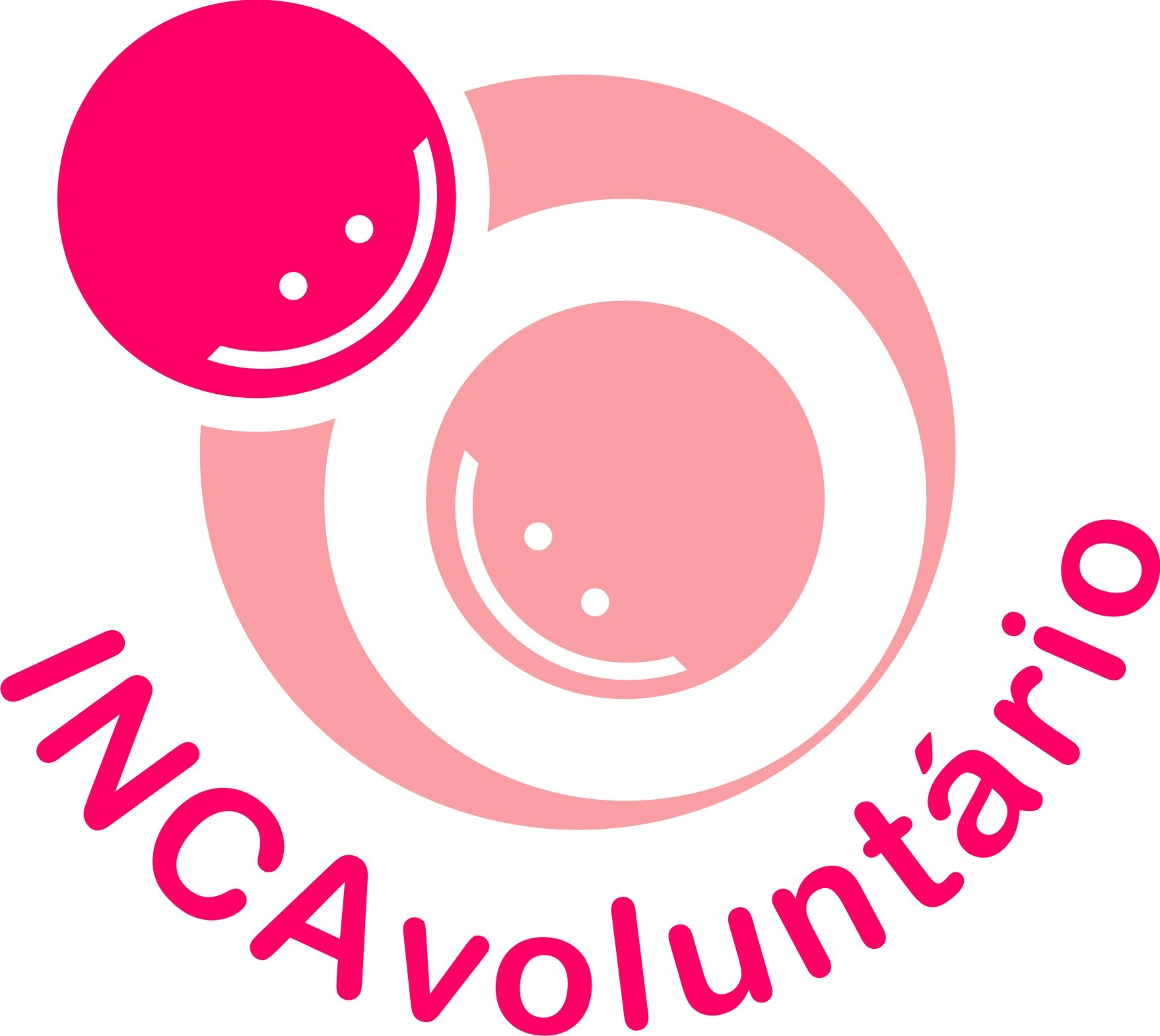 Logo do programa INCAVoluntário